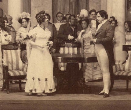 На переднем плане: графиня-внучка — Е. Лешковская, Чацкий — П. Садовский; на заднем плане: Наталья Дмитриевна — А. Яблочкина, Хлестова — М. Ермолова, Фамусов — К. Н. Рыбаков. Спектакль «Горе от ума», Малый театр. 1911.